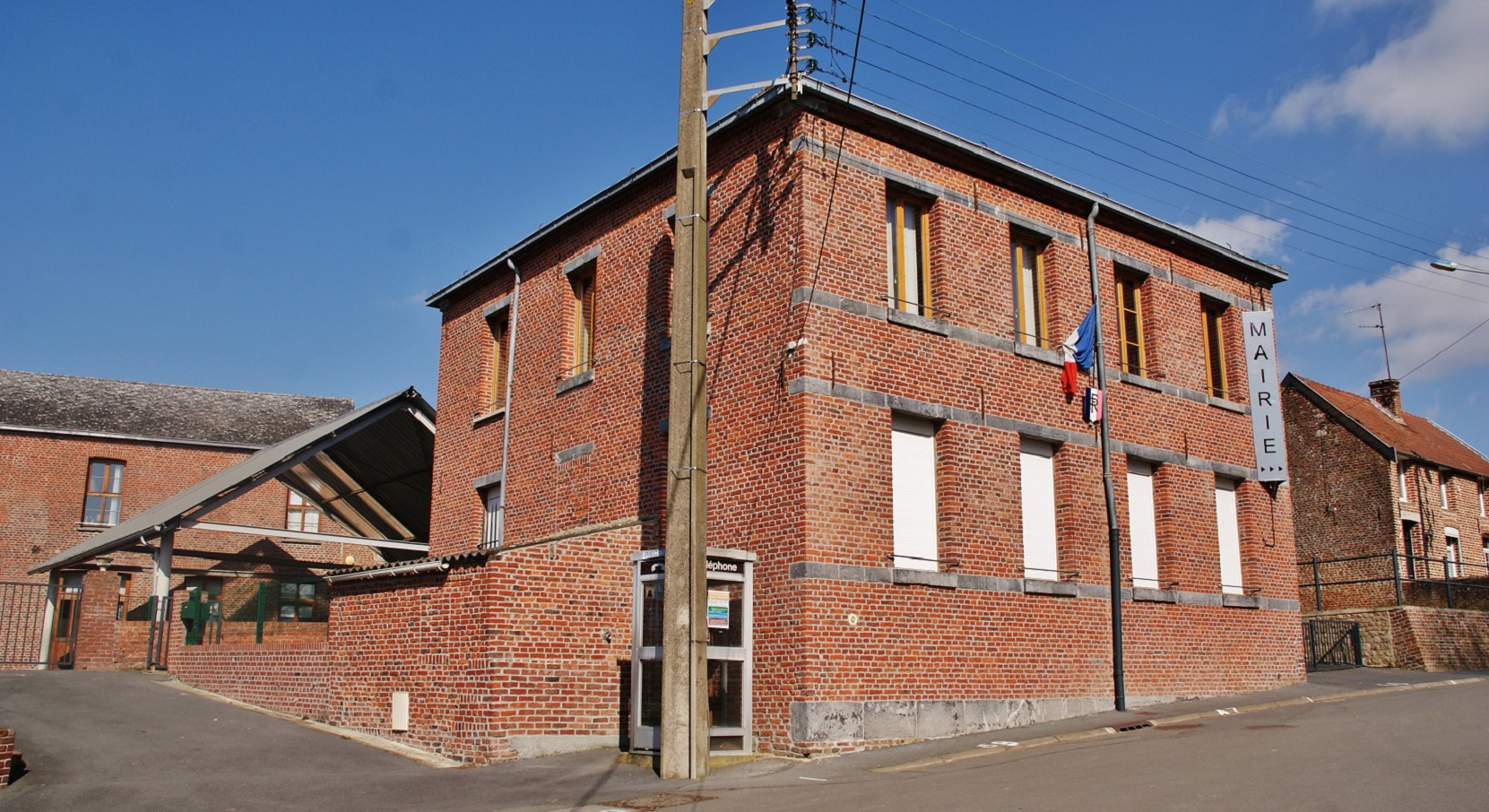 La Mairie